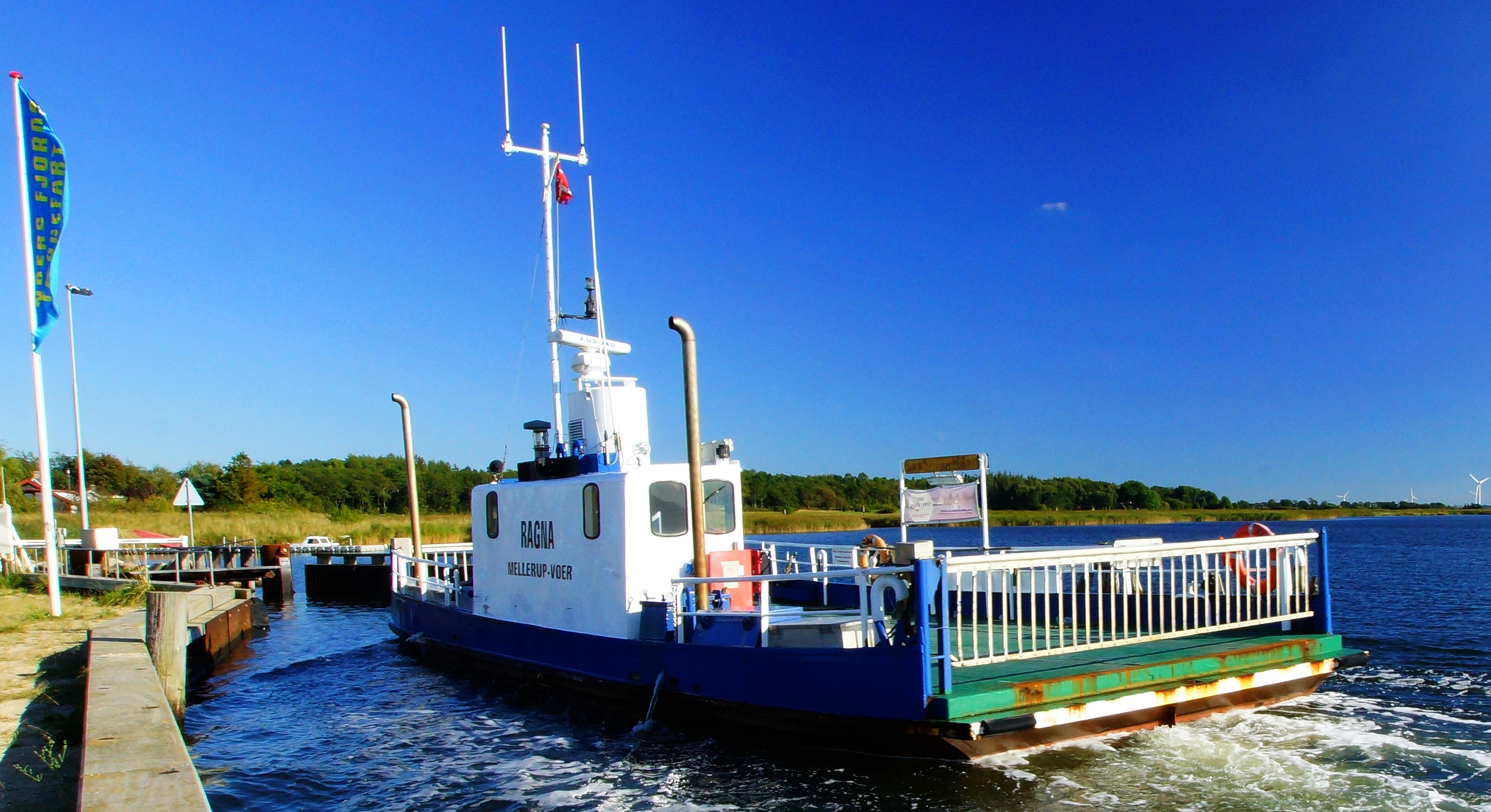 Ragna, Voer-Mellerup færgen, Randers Fjord